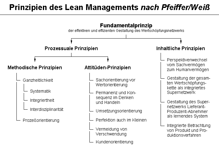 Lean Management-Prinzipien nach Pfeiffer und Weiß, vgl. Pfeiffer/Weiß: Lean Management, 2. Aufl., Berlin 1994, S. 57